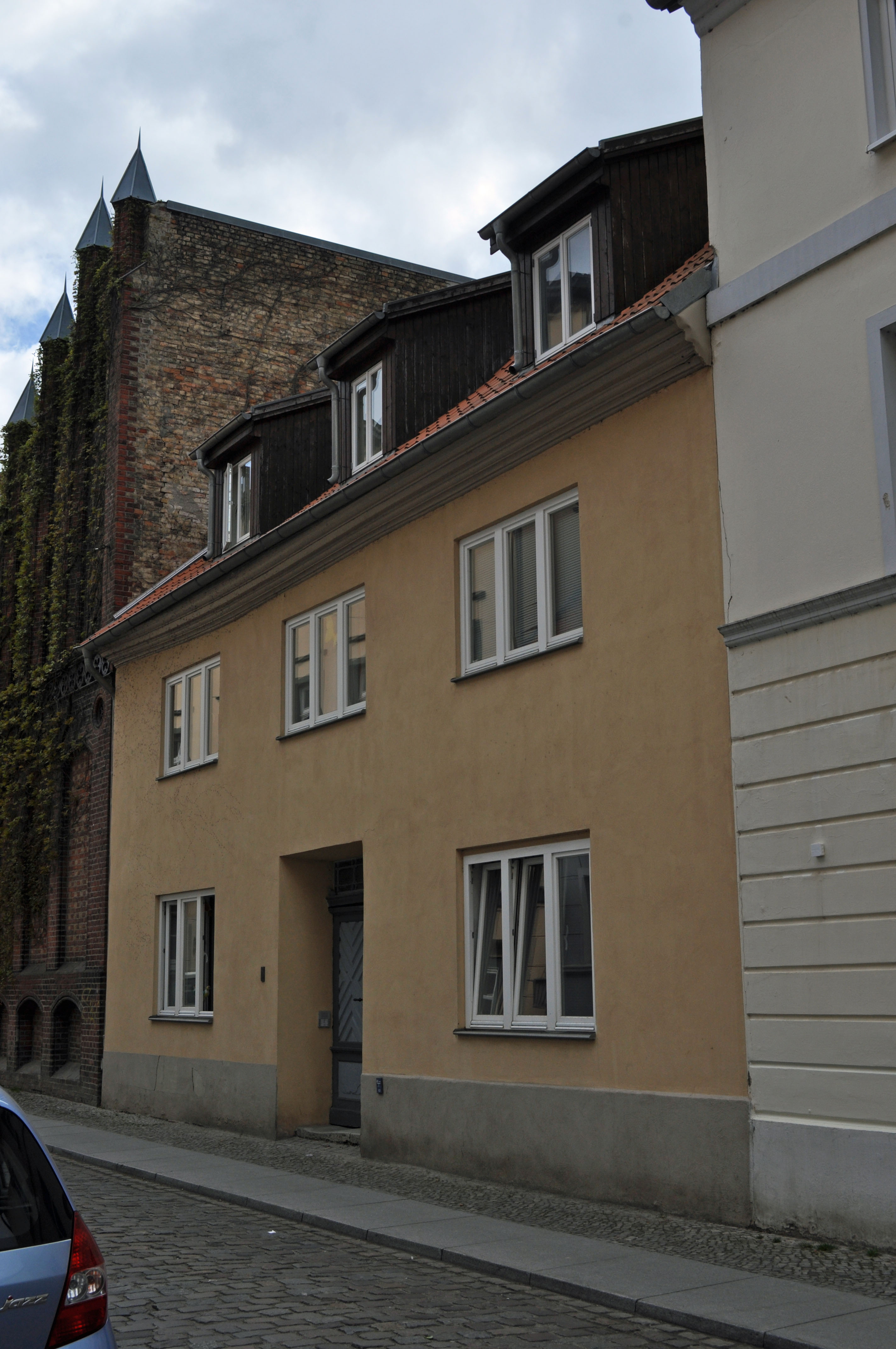 Gebäude in Stralsund, siehe Dateiname